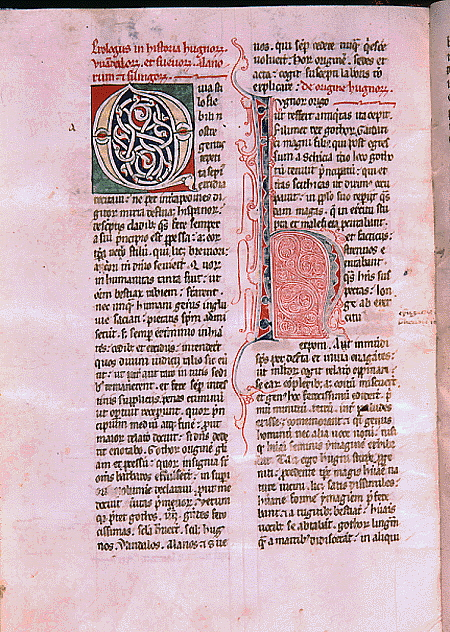 Manuscrito de De rebus Hispaniae